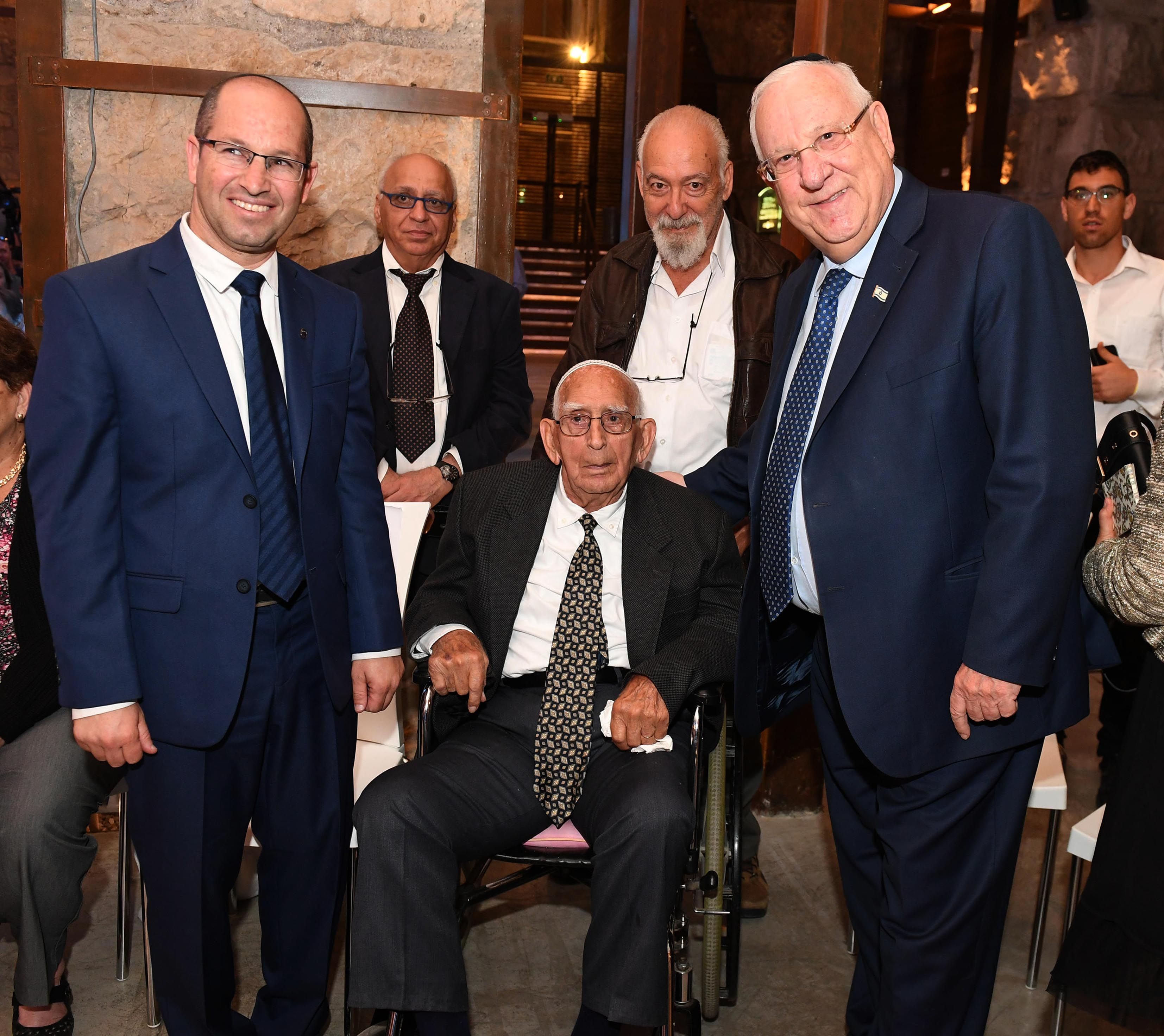 ראובן ריבלין נשיא מדינת ישראל בטקס פתיחת מוזיאון "פלוגת הכותל" ברובע היהודי בירושלים. בתמונה מקדימה: מימין לשמאל – ראובן ריבלין, יעקב-סיקא אהרוני ומנכ"ל בית"ר העולמית נריה מאיר.